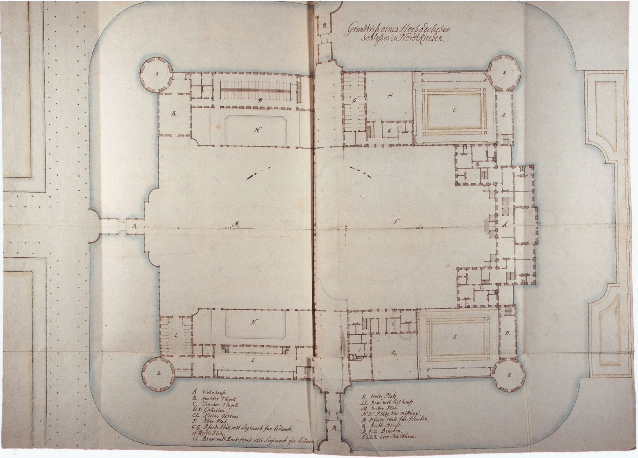 Ausführungsentwurf des Generalplans für den Neubau von Schloss Nordkirchen